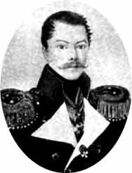 Автопортрет Ивана Ивановича Левенштерна